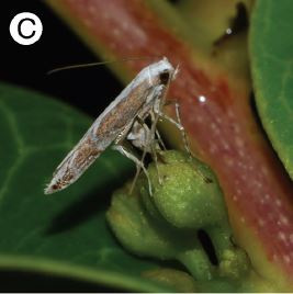 Epicephala bipollenella